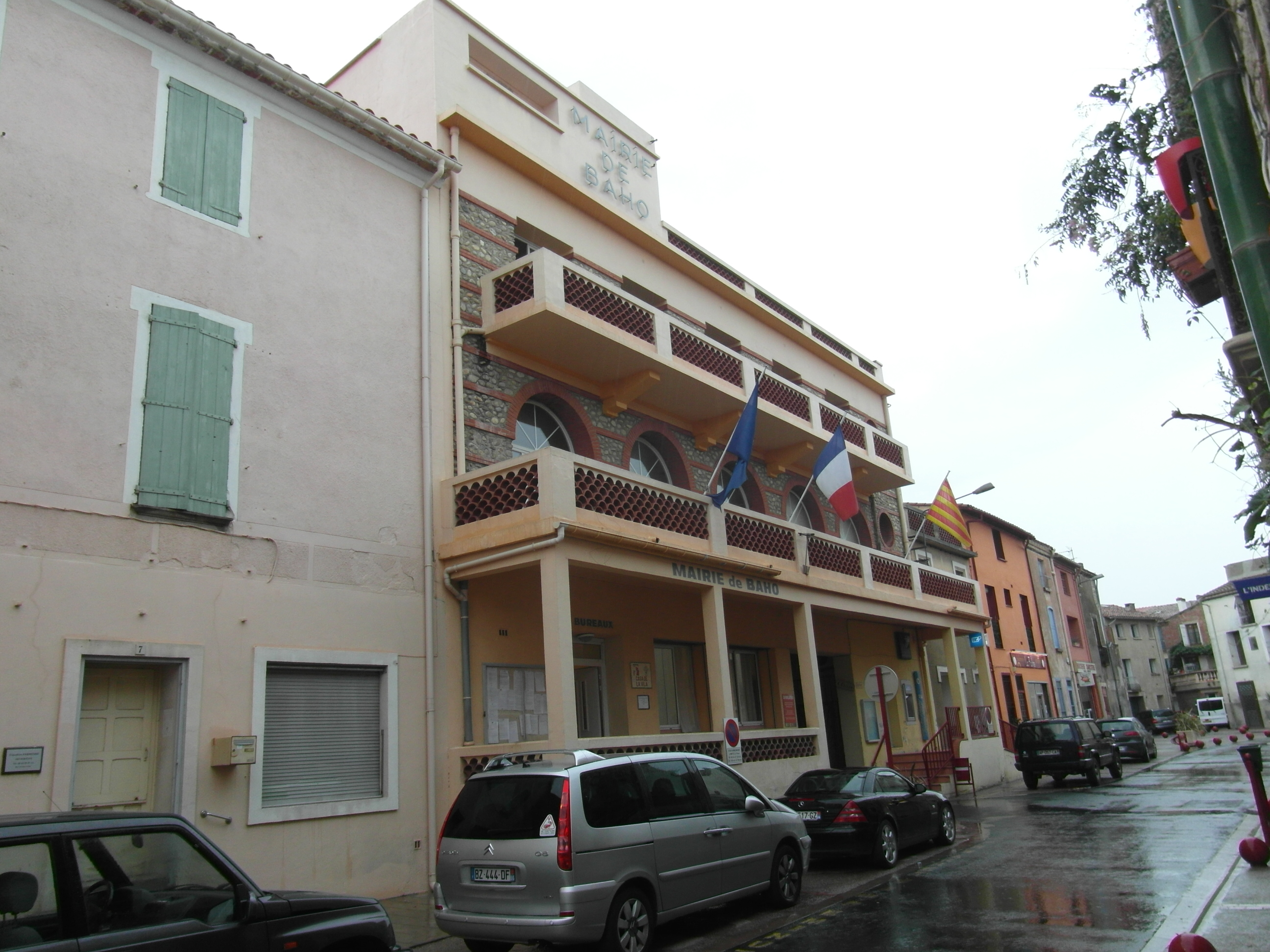 Mairie Baho